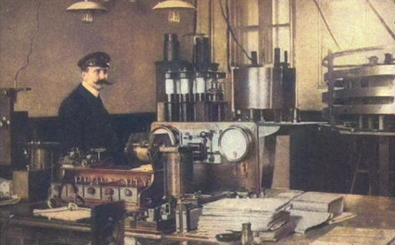 station radiotélégraphique Ouessant TSF à Lampaul 1922